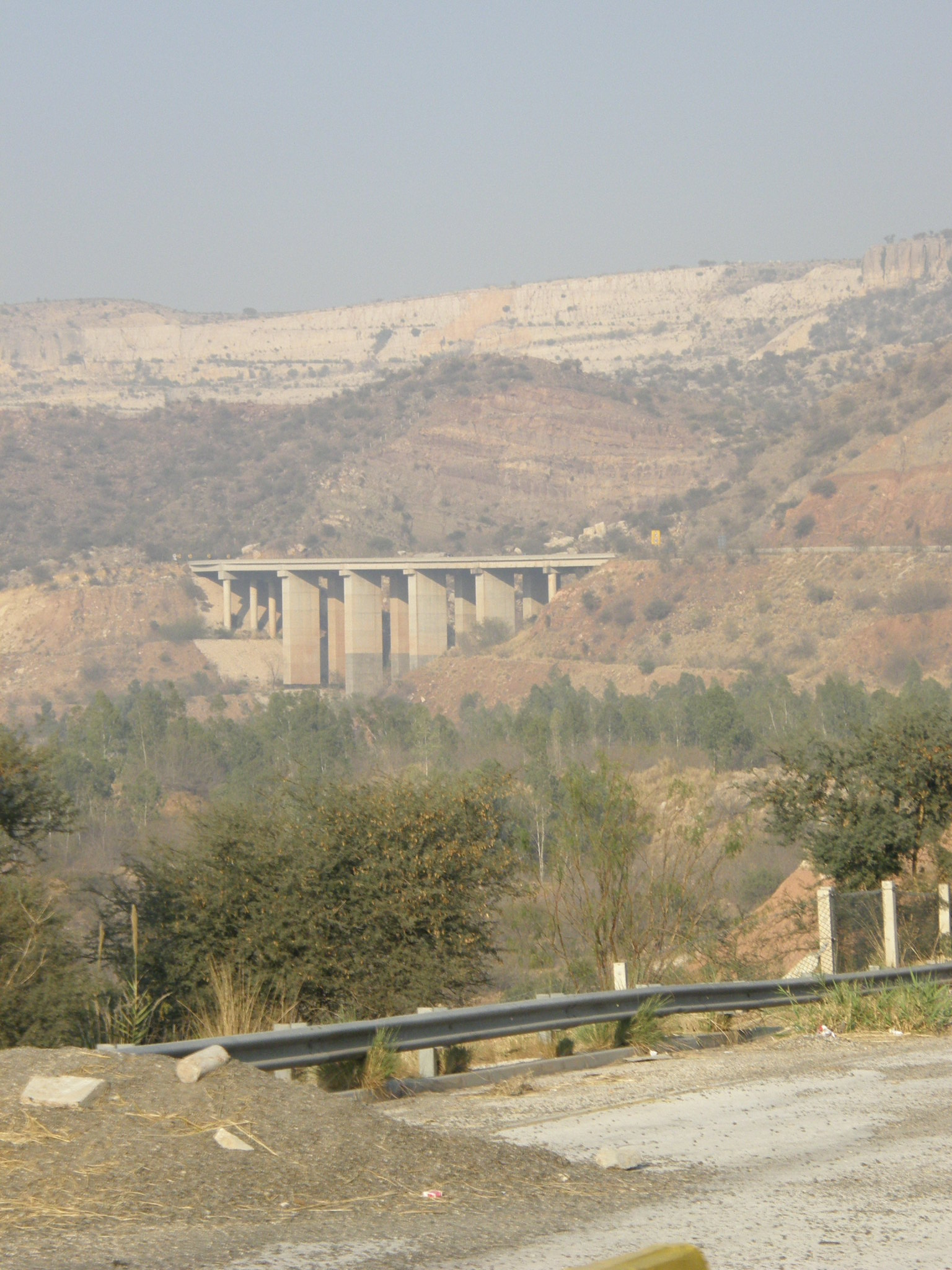 Visit to Khewra Salt Mines Pakistan